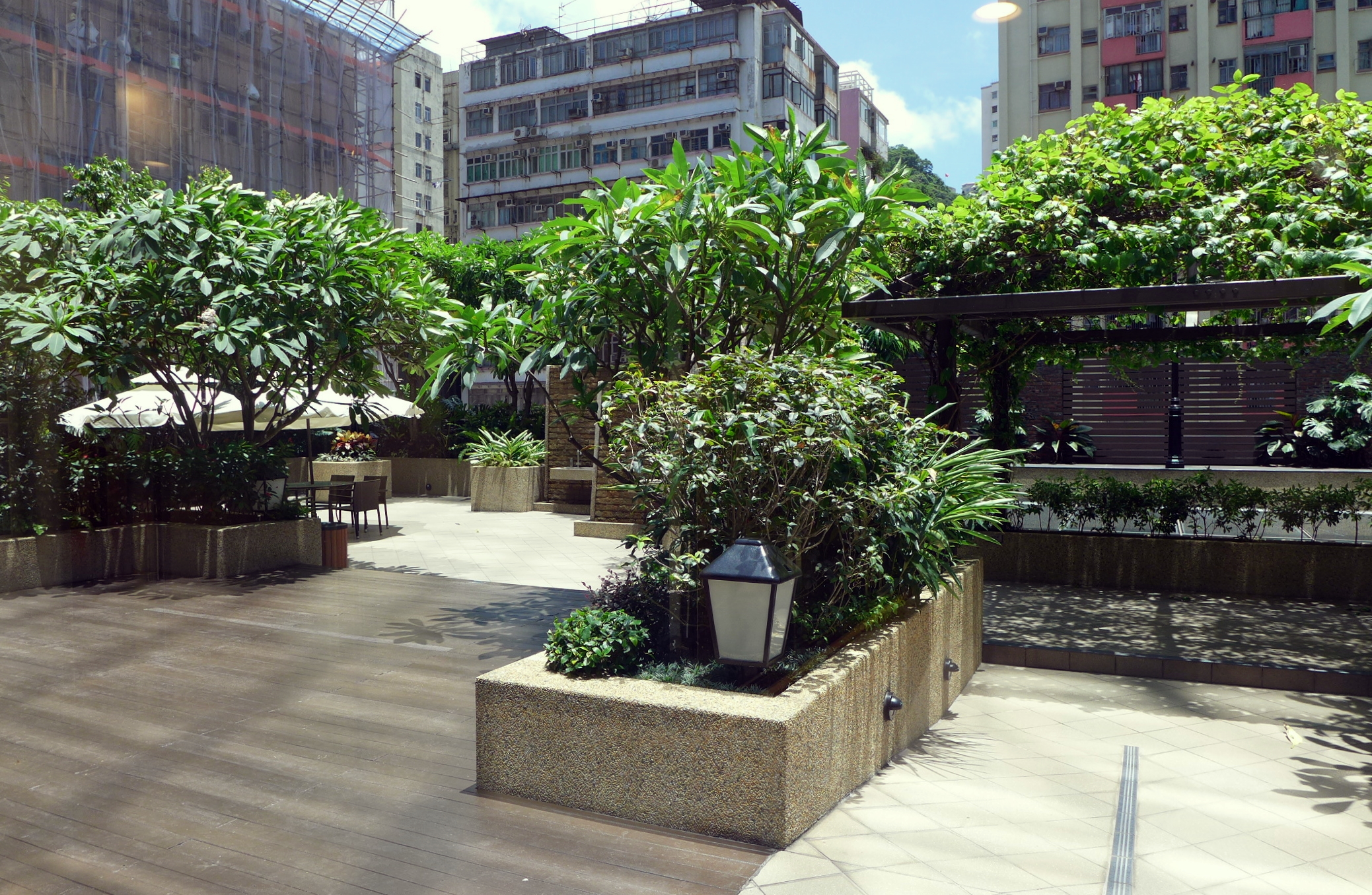 Kerry Centre Level 3 Garden